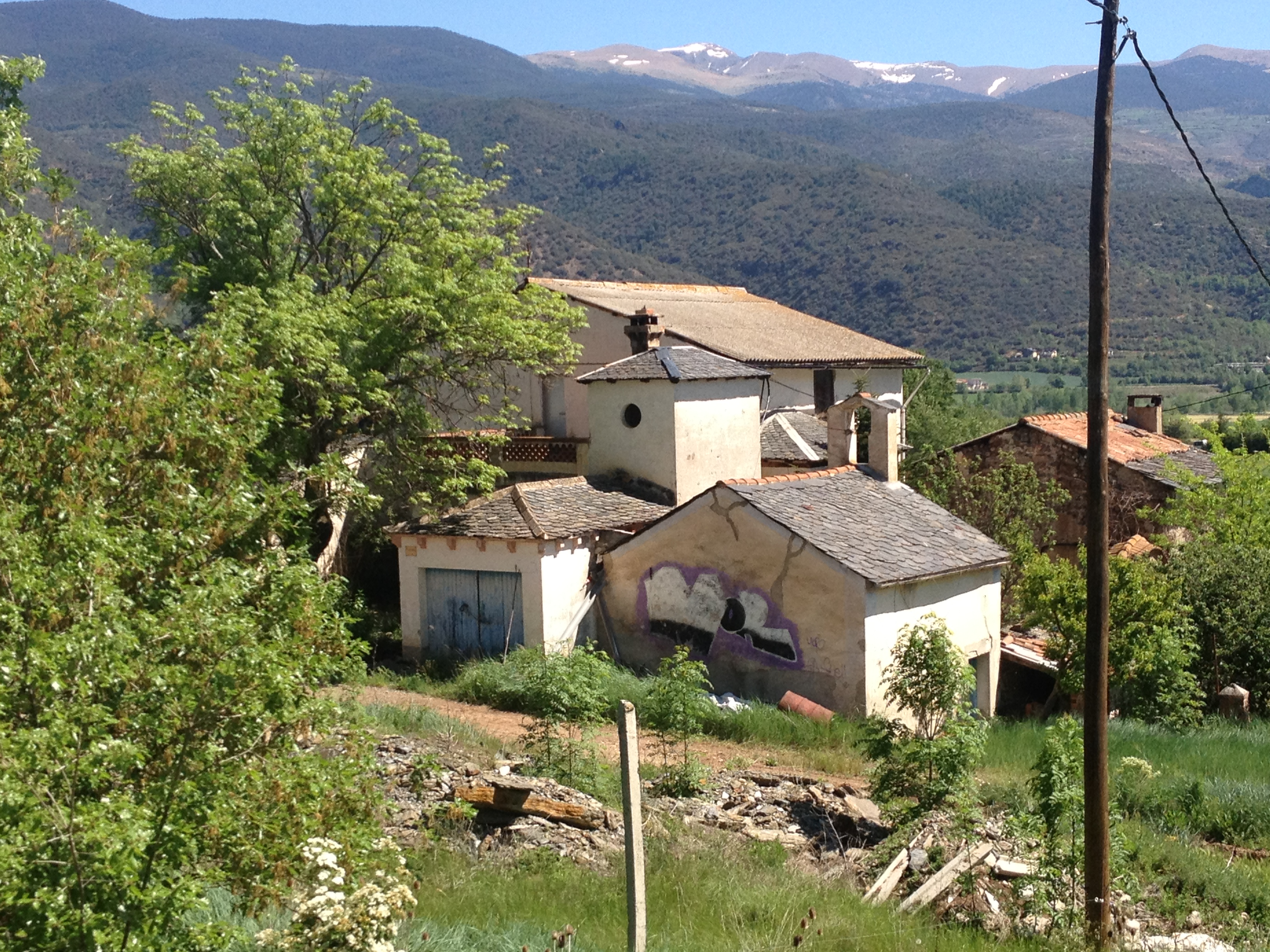 Torre del Cap, la Seu d'Urgell